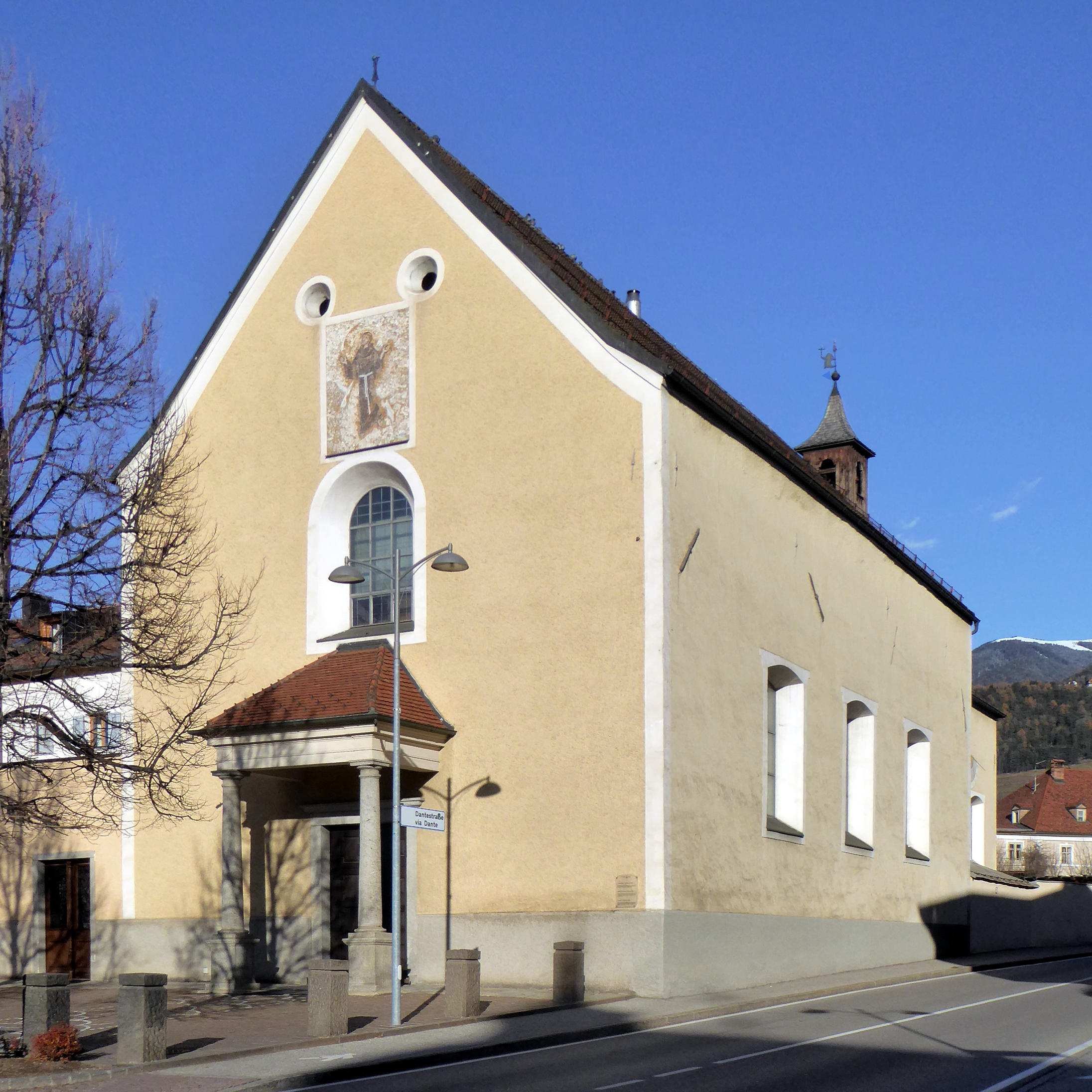 Bruneck (Südtirol), Kapuzinerkirche von Südwesten gesehen.